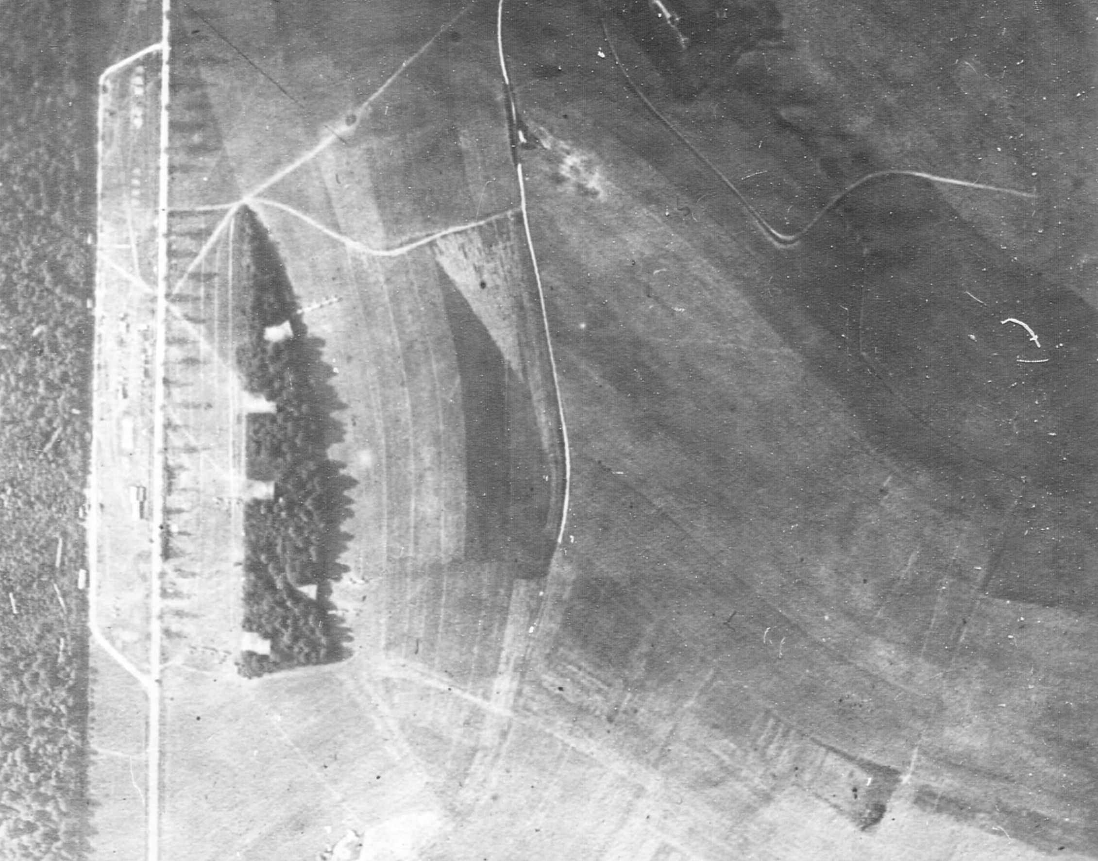 Vaucouleurs Aerodrome - North - France